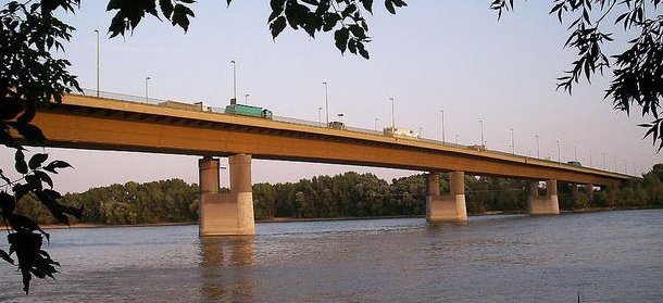 Deák Ferenc bridge